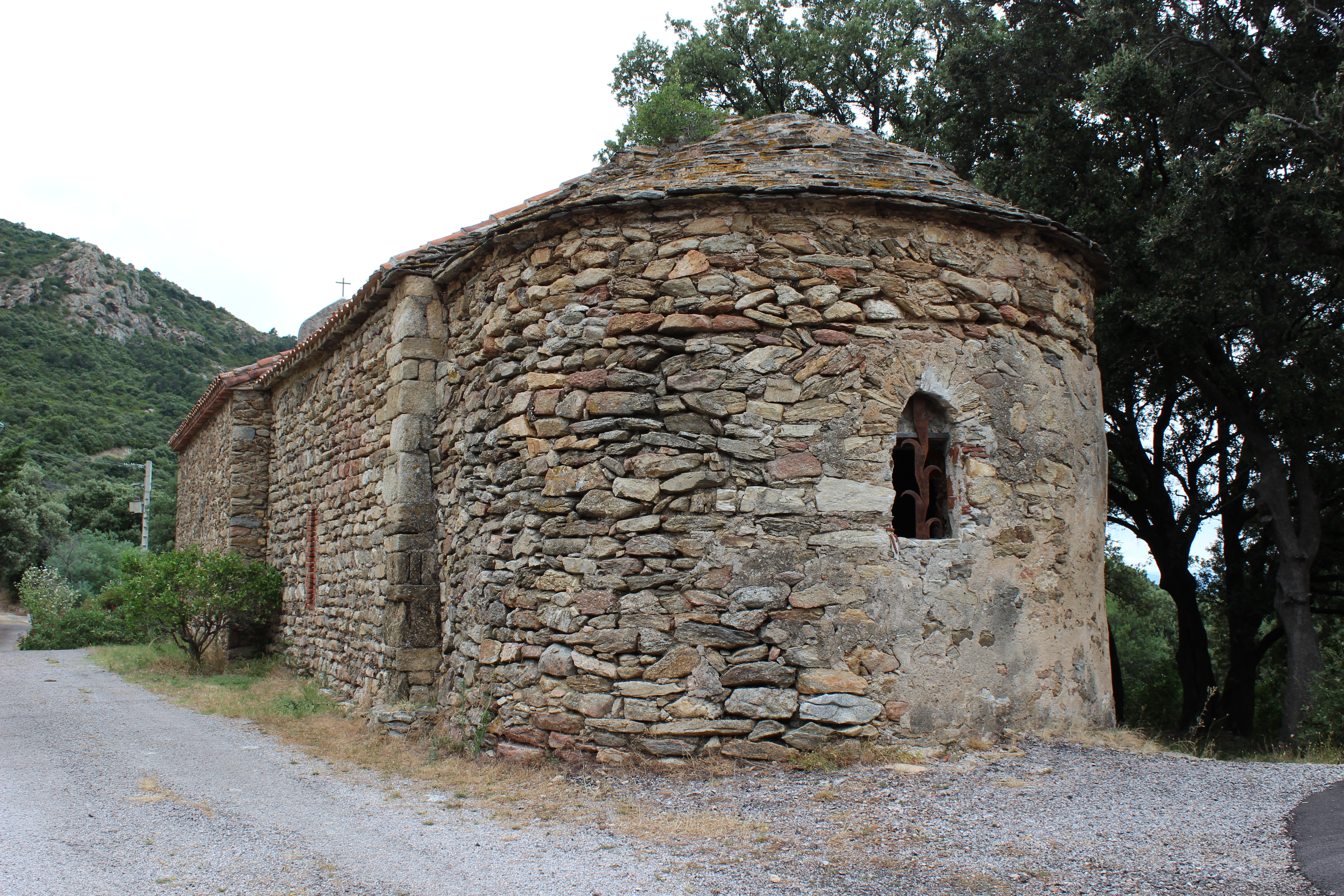 Ermitage de Saint-Ferréol-de-la-Pave, abside